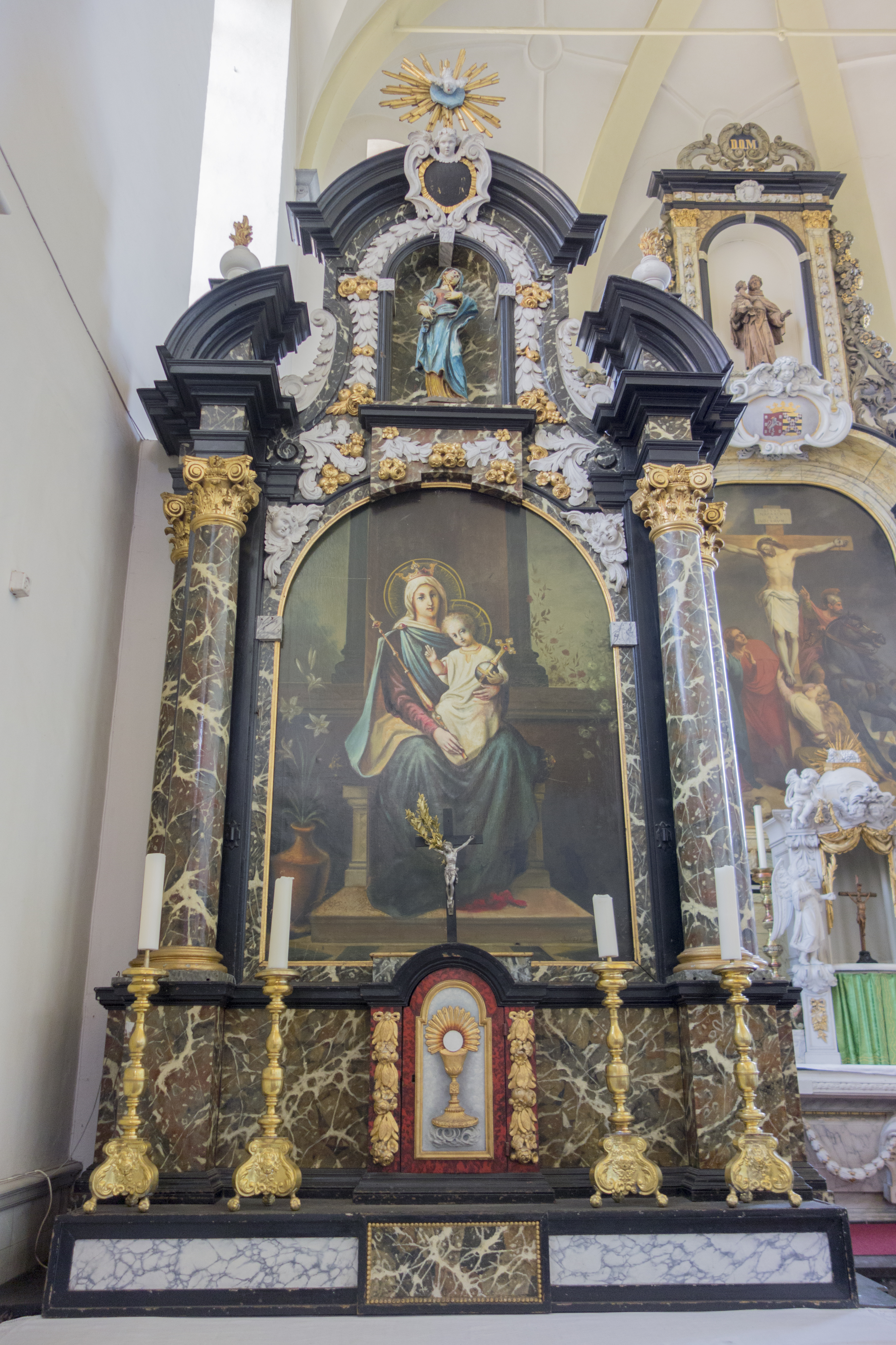 Bovenin het altaar staat een beeld van de heilige Clara van Assisi, een vrouwelijke volgeling van Franciscus van Assisi. Naar haar is de vrouwelijke kloosterorde vernoemd die de richtlijnen van Franciscus volgt. Dit altaar is in de barokke stijl en is geheel gemaakt van hout.